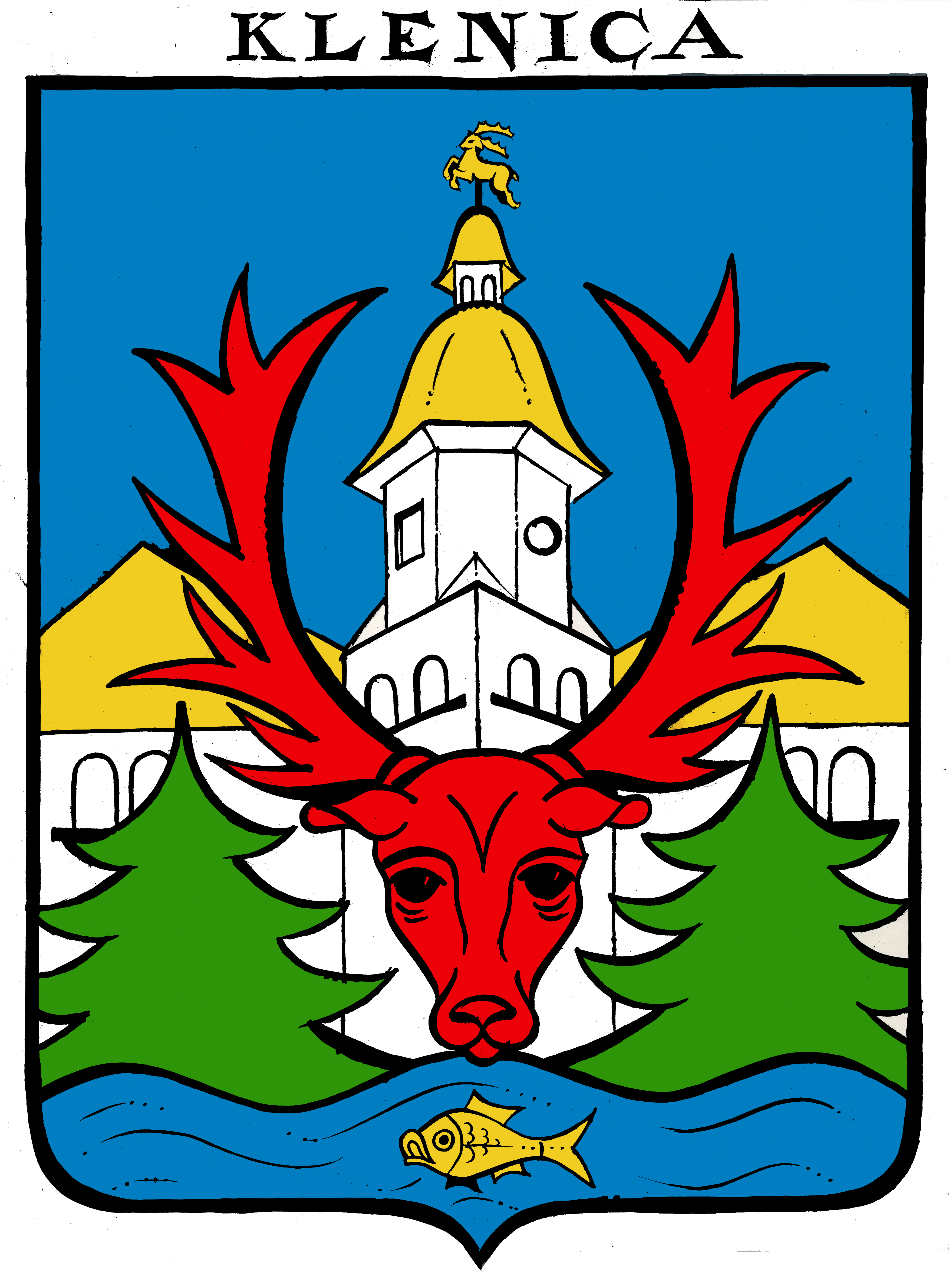 Herb Klenicy. Autorem jest pan Nowotarski.